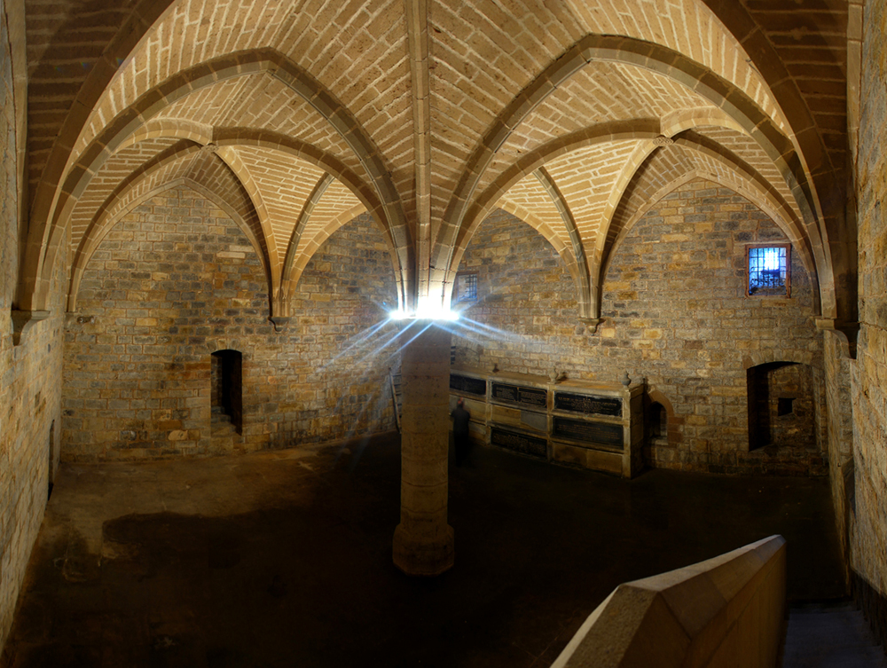 Cripta de la capilla Barbazana